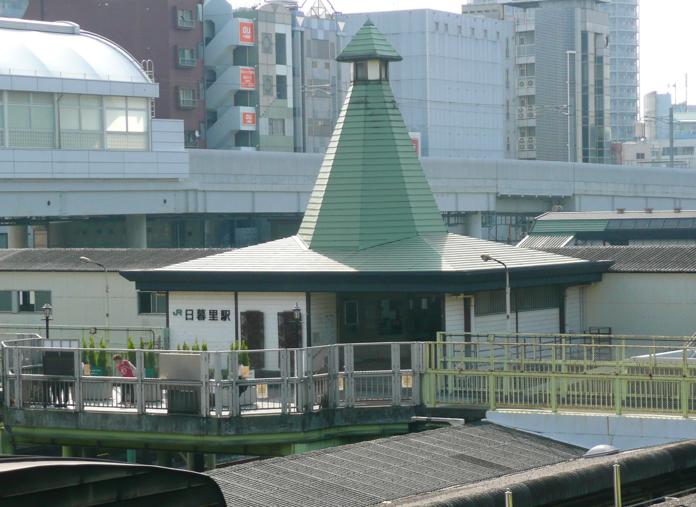 JR日暮里駅南口